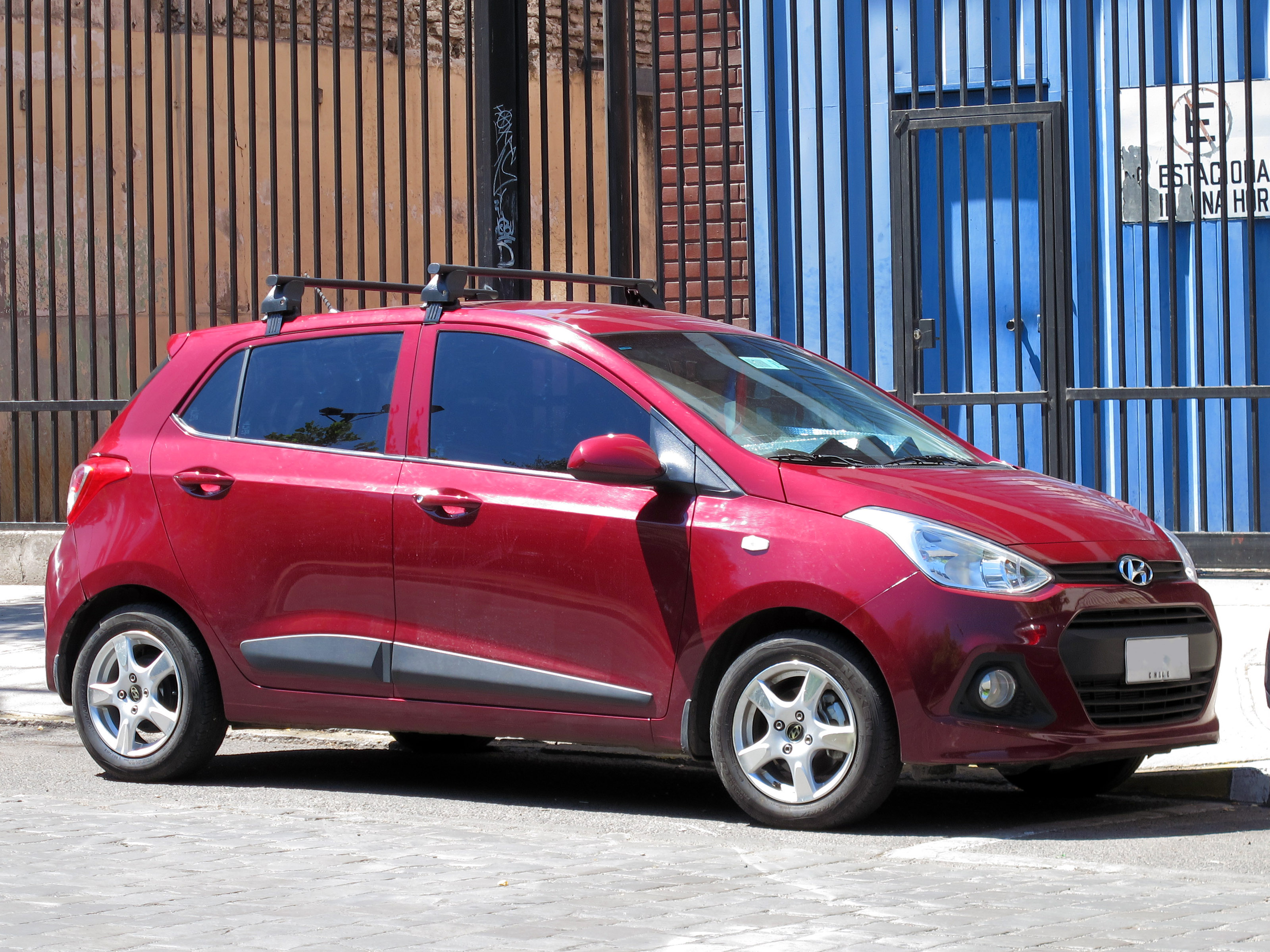 Hyundai Grand i10 1.2 GLS 2015